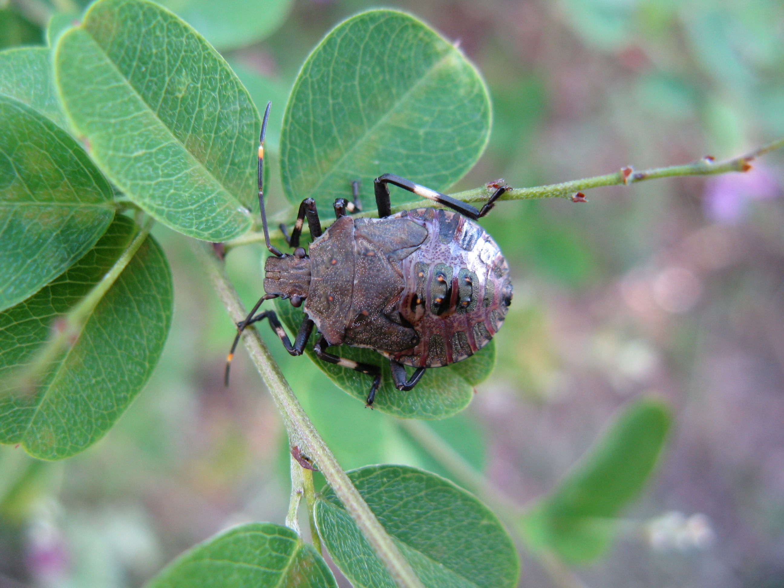 Halyomorpha halys